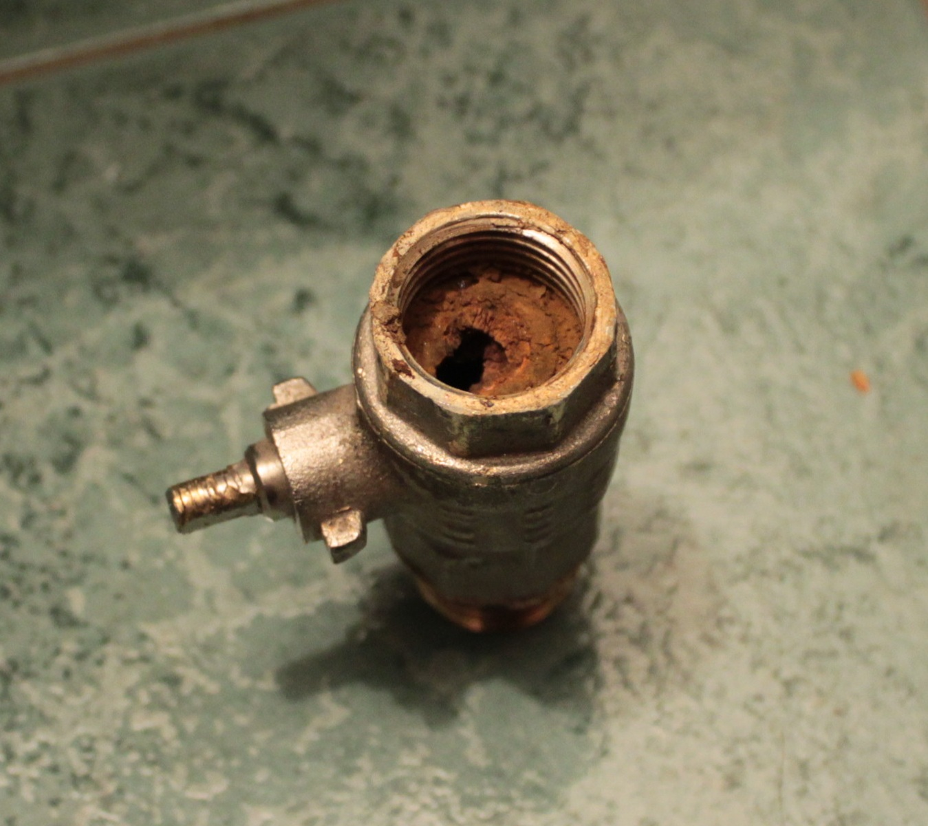 Коррозия труб - причина образования окалины, ухудшающей ток воды